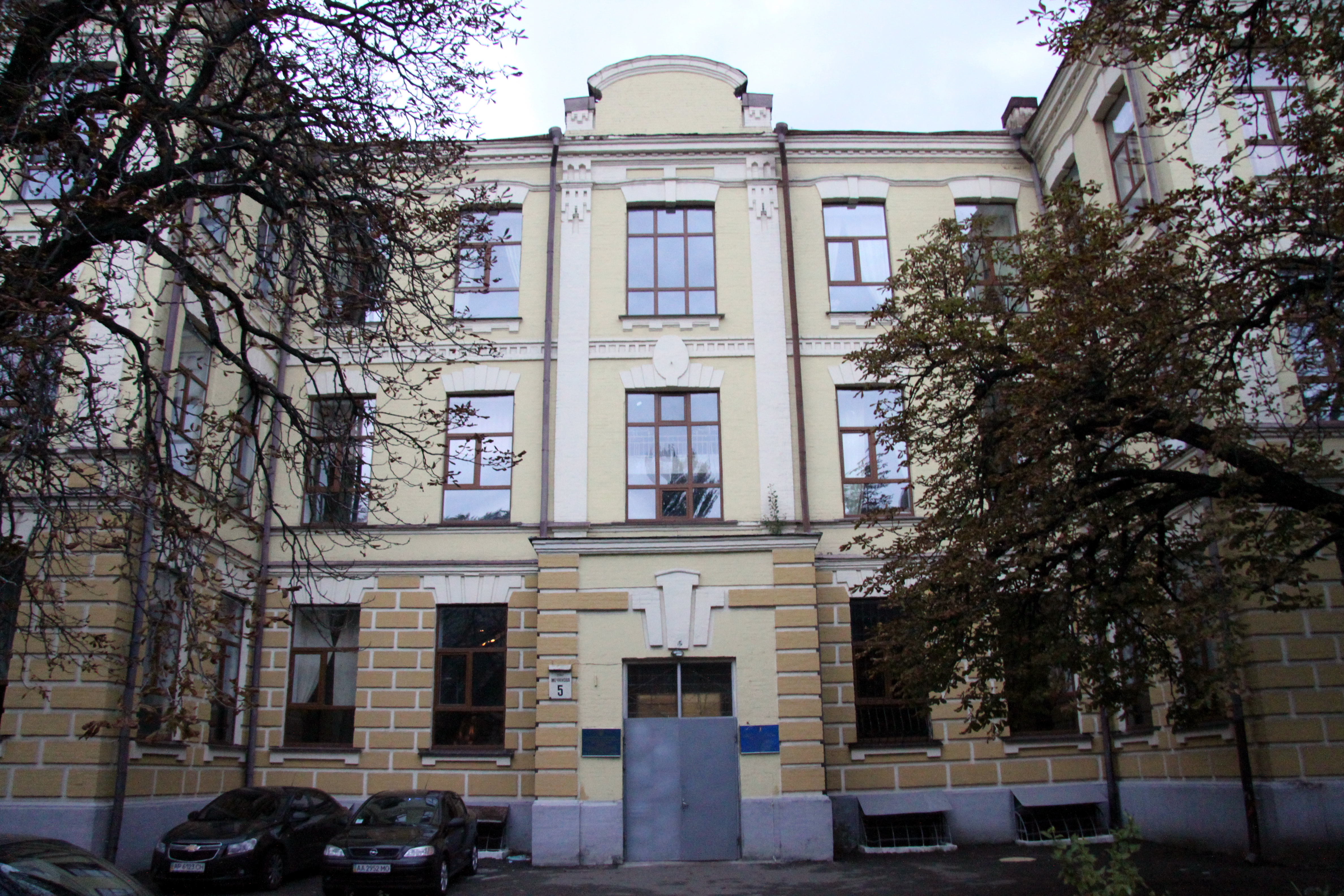 Будинок, де містився Печерський комітет РСДРП(б), Київ, Мечникова вул., 5